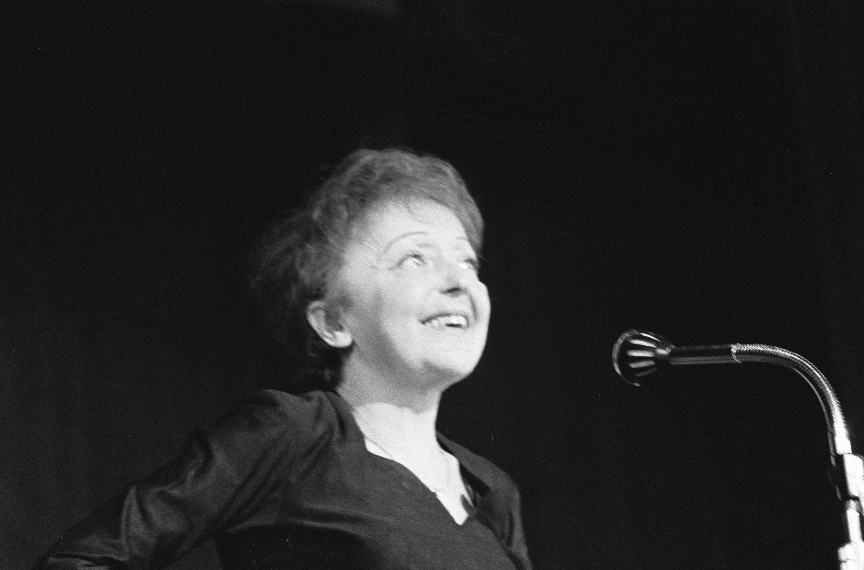 Collectie / Archief : Fotocollectie Anefo Reportage / Serie : [ onbekend ] Beschrijving : Edith Piaf zingt in ons land Datum : 13 december 1962 Locatie : Rotterdam, Zuid-Holland Trefwoorden : muziek, zangeressen Persoonsnaam : Piaf, Edith Fotograaf : Koch, Eric / Anefo Auteursrechthebbende : Nationaal Archief Materiaalsoort : Negatief (zwart/wit) Nummer archiefinventaris : bekijk toegang 2.24.01.05 Bestanddeelnummer : 914-6444